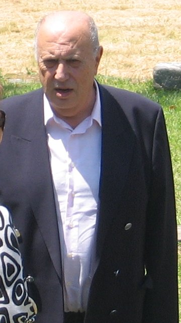 Xosé Luís Méndez Ferrín durante a entrega do Premio Trasalba en 2007